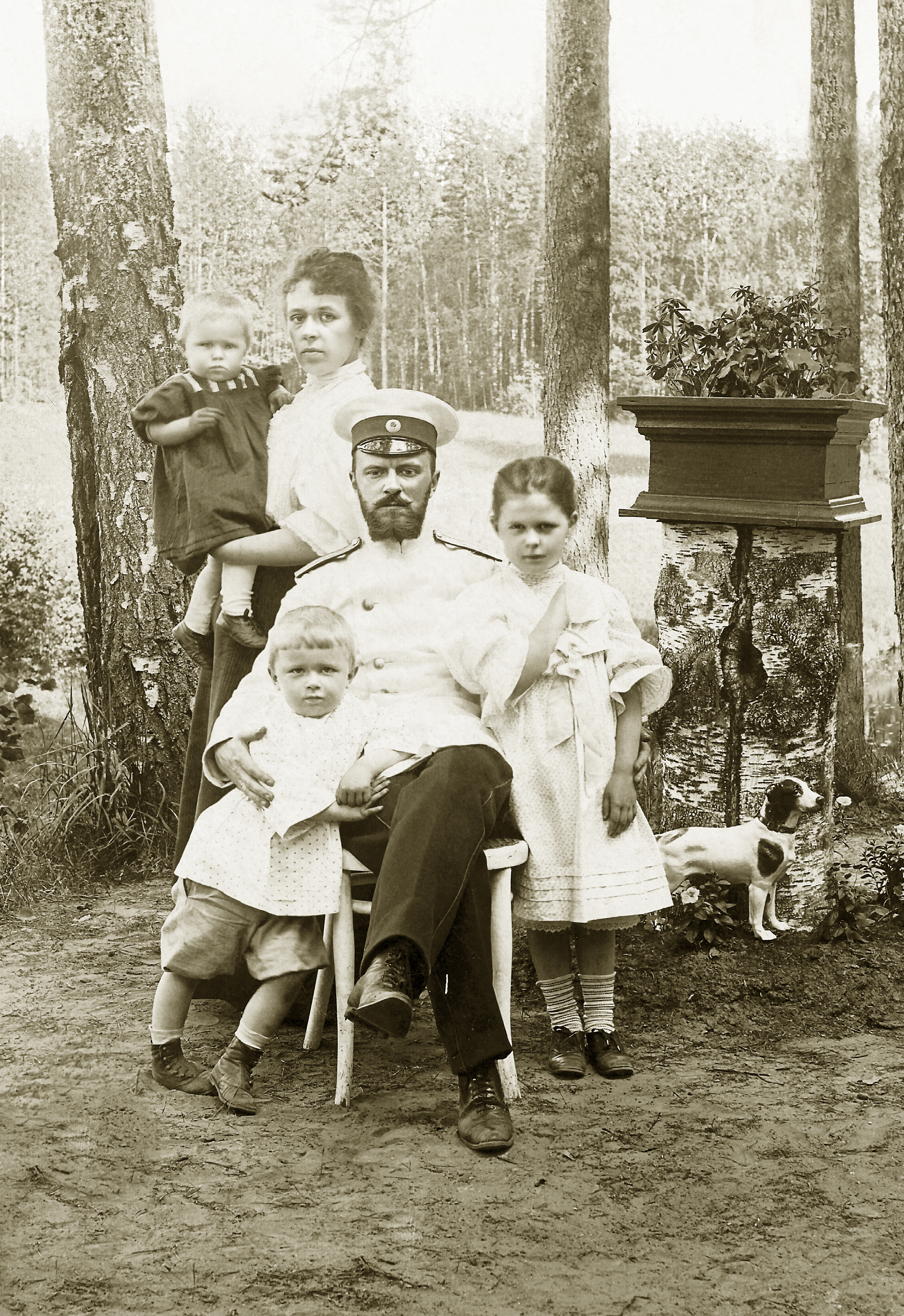 Семья доктора медицины, профессора Императорской военно-медицинской академии, начальника кафедры детских болезней Александра Николаевича Шкарина. Любань.